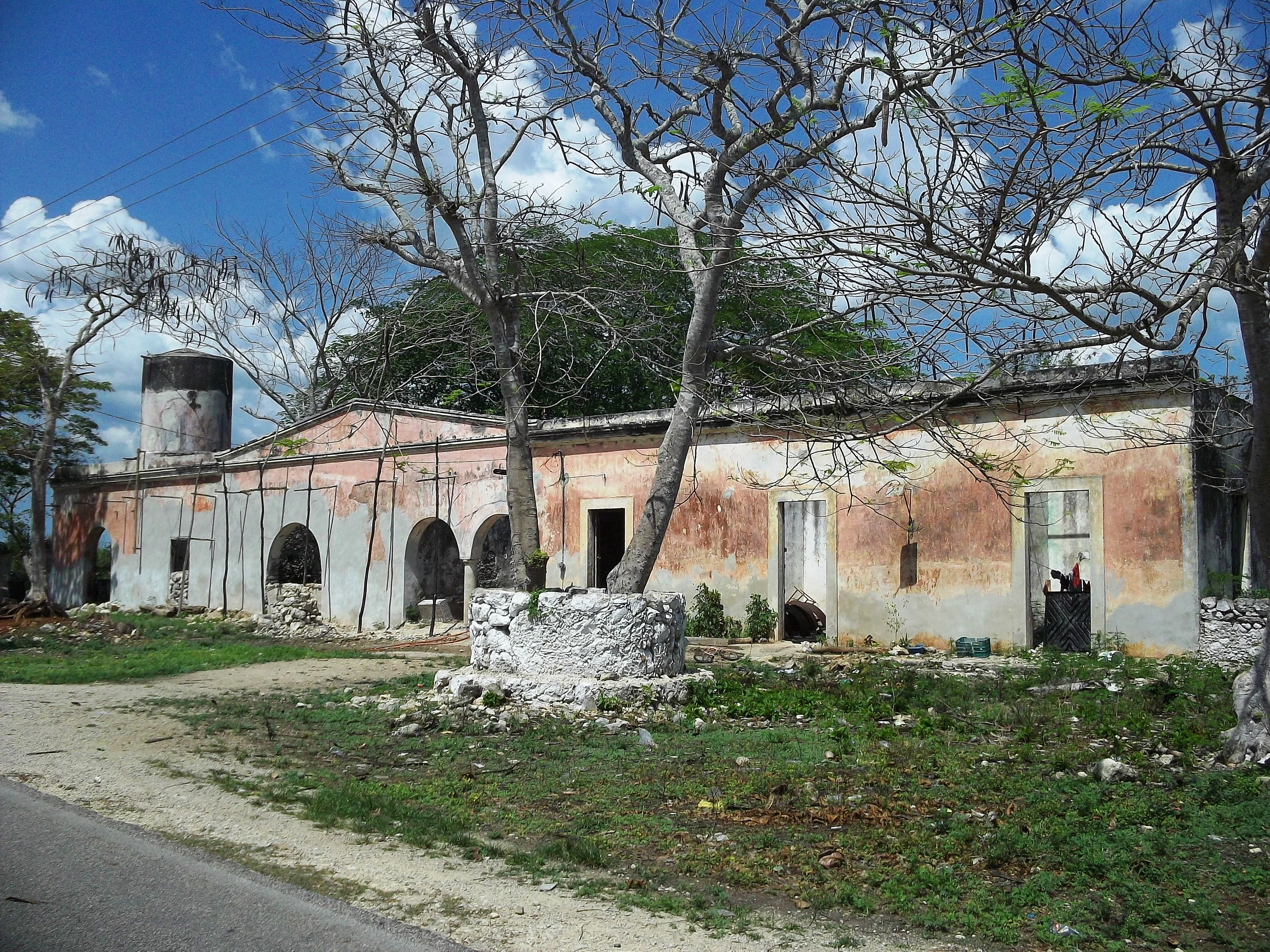 San Antonio Cámara, Yucatán.